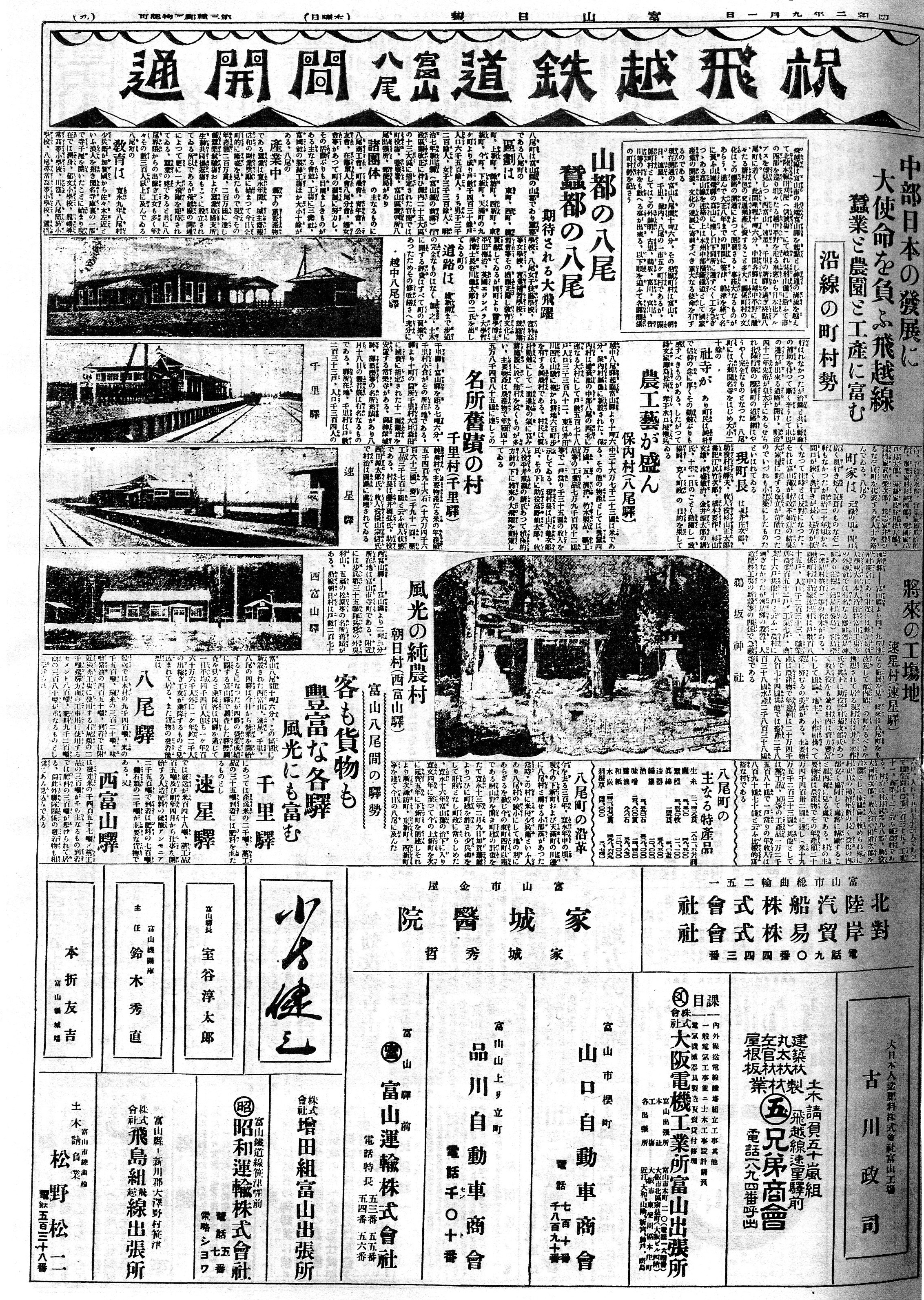 飛越線富山 - 越中八尾間が開業した旨を報ずる新聞記事